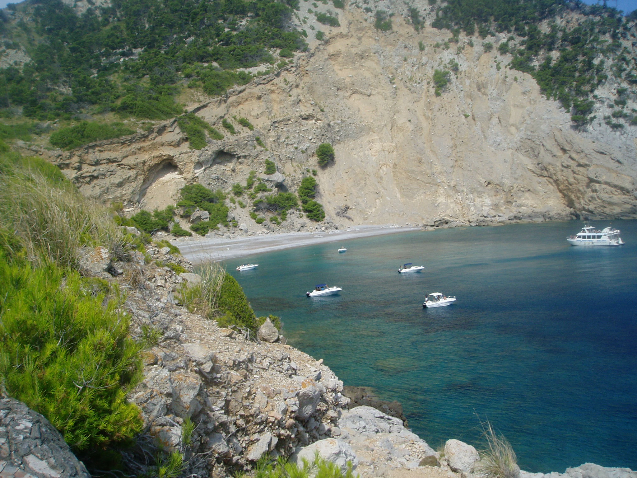 Vista de la la cala del Coll Baix, situada al municipi d'Alcúdia (Mallorca)